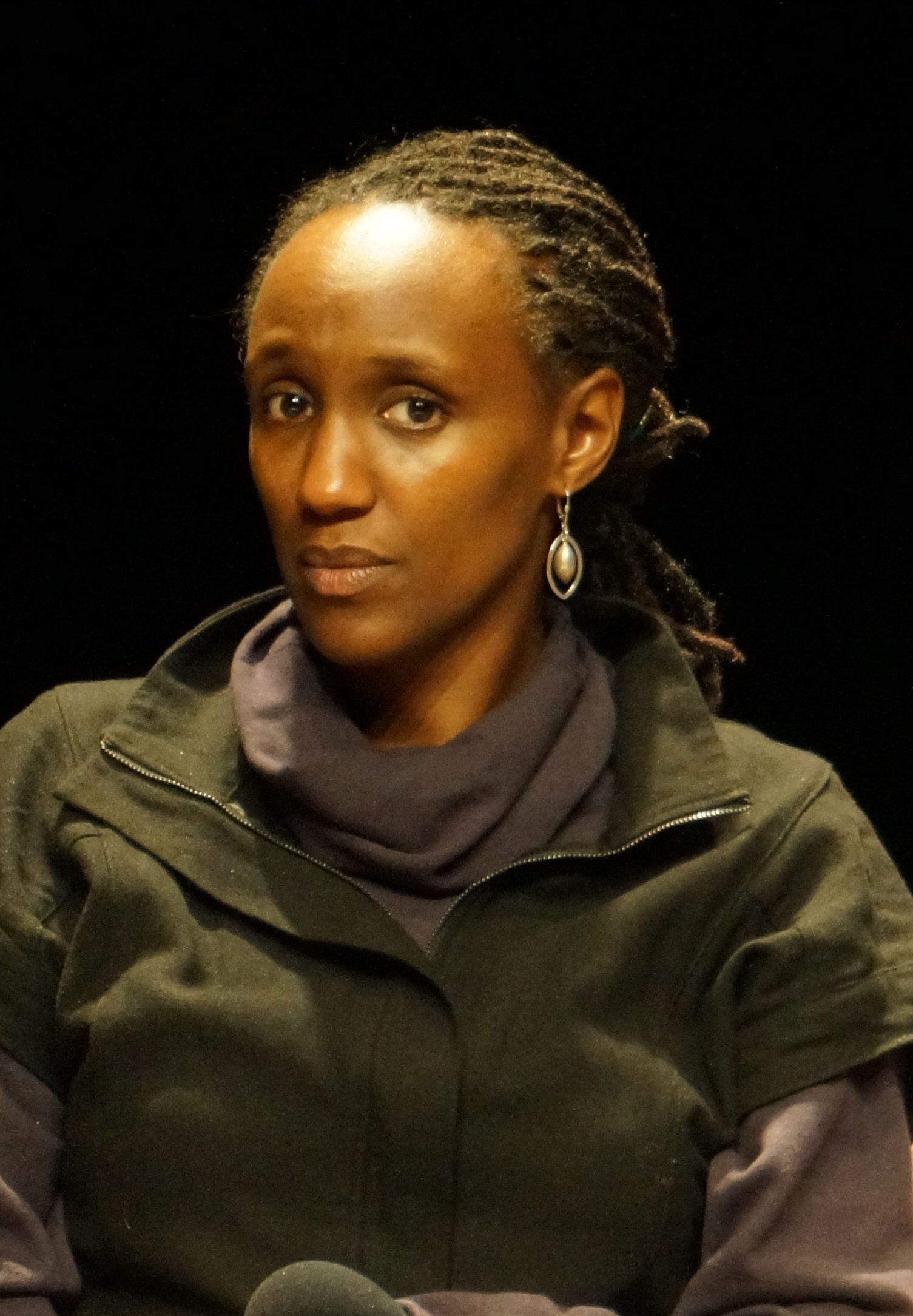 lors de Reims scènes d’Europe 2015.